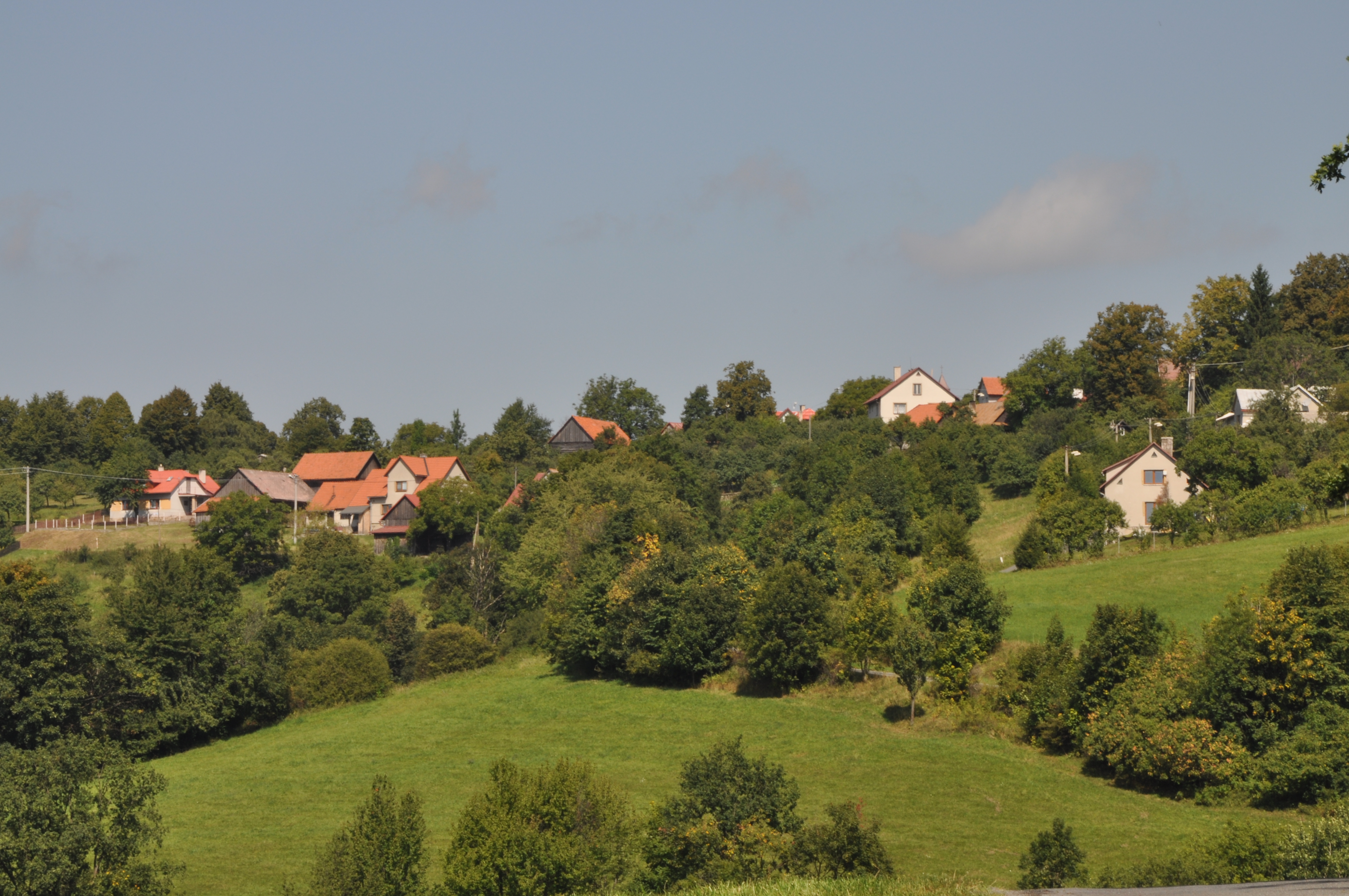 Pulčín od jihu